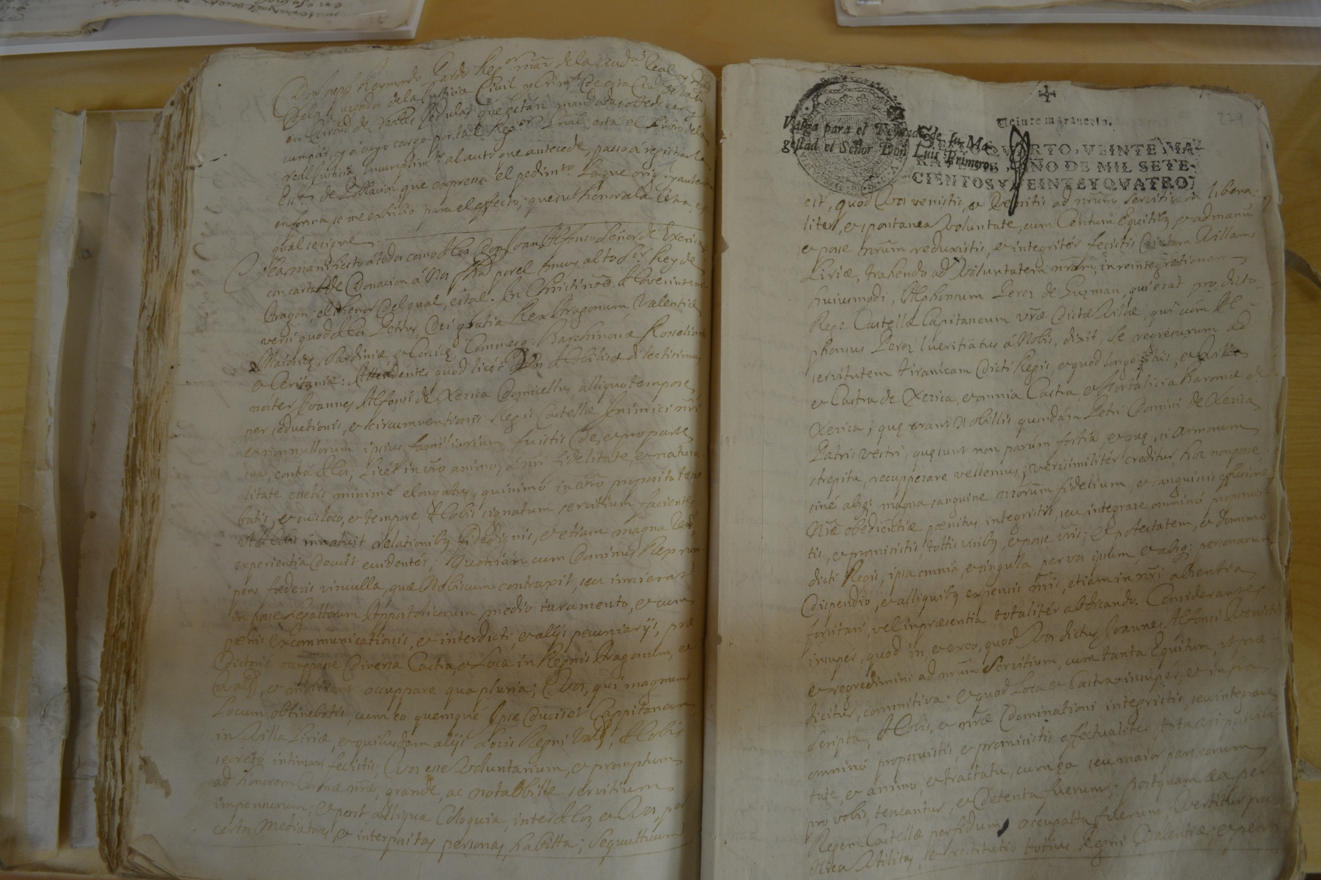 En Joan Alfons de Jérica, senyor de Jérica, Chelva, Eslida, etc., concedeix el 7 de febrer de 1369, carta pobla per a 250 pobladors cristians que hi vaguen a repoblar la vila de Chelva a fur d'Aragó, després de l'expulsió dels seus habitants muusulmans. Arxiu del Regne de València. ARV: Reial Justicia, llibre 788, fol. 278v (còpia de 27 de març de 1724)